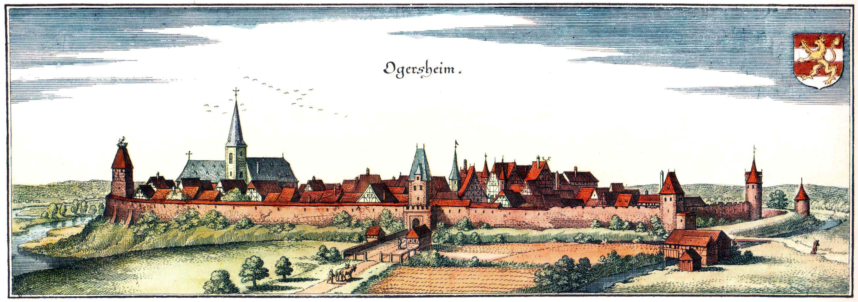 “Ogersheim” (= Oggersheim/Rheinland-Pfalz) Kupferstich von Matthaeus Merian, um 1650